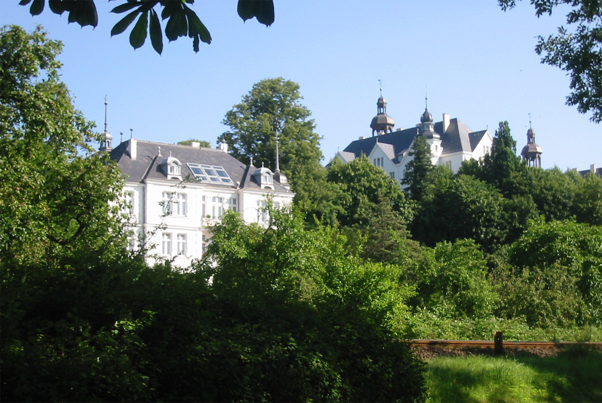 GNU-FDL; Schloss Plön; Juli 2004; Selbstfotografiert